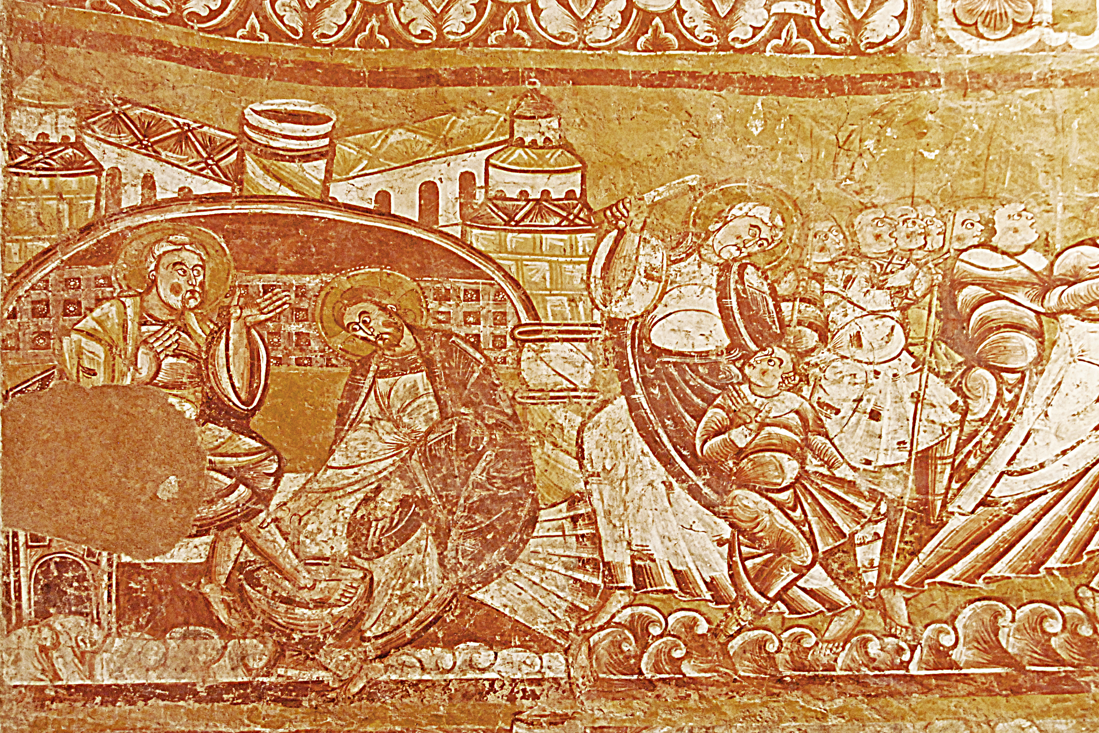 Chor, Nordwand, Fußwaschung + Abraham